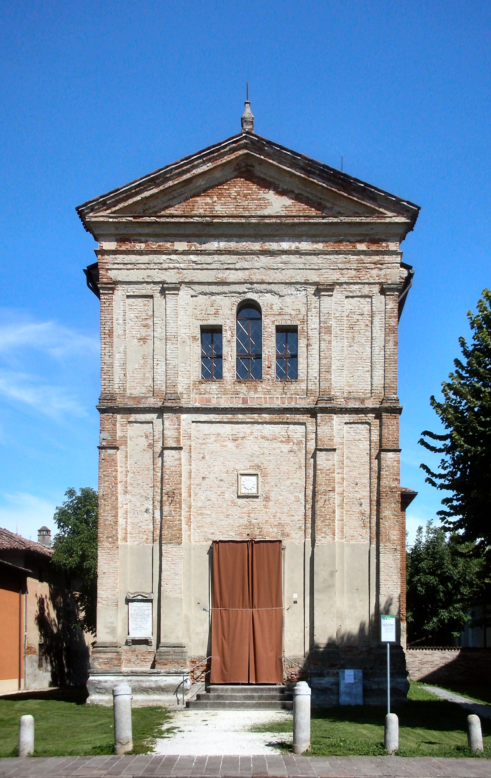 Oratorio della Santa Trinità